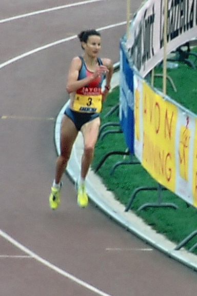 Sonia O’Sullivan gewinnt beim Straßenlauf in Mailand, hier biegt sie auf die Zielgerade in der Arena Civica ein